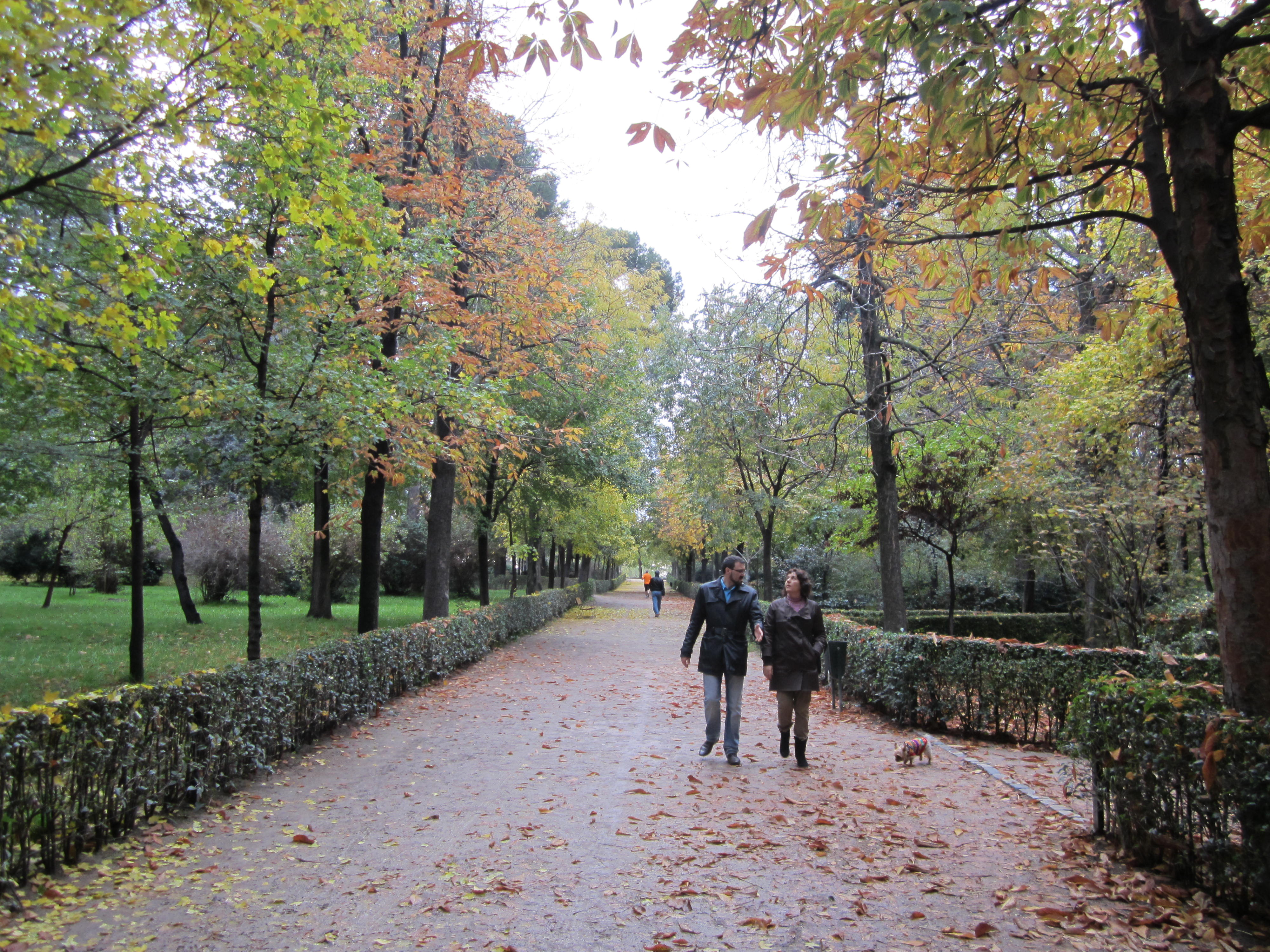 Autumn walk, Madrid's Park Retiro